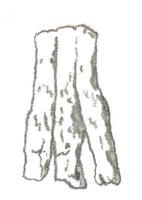 Illustration of a fossil of Avipes